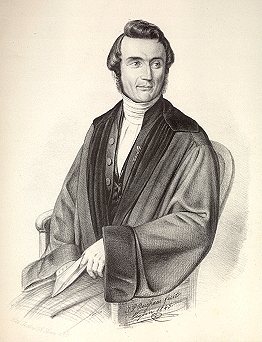 Johannes Henricus Scholten (1811-1885), niederländischer Theologe / dutch theologian